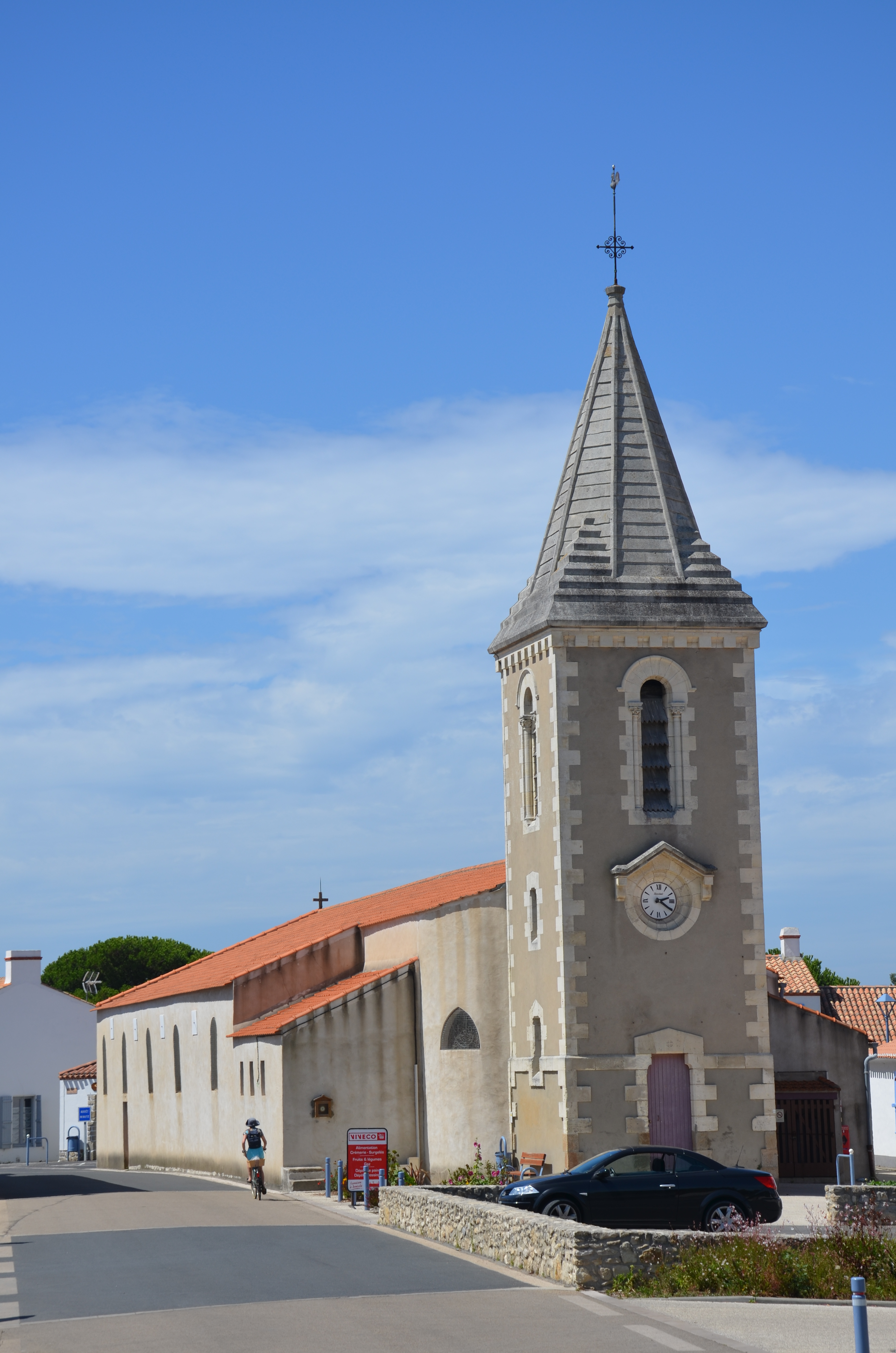 Église de L'Épine (Vendée).